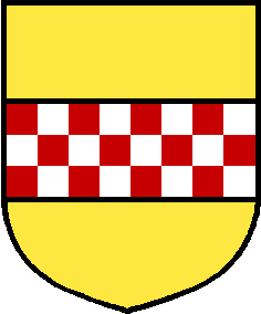 Wappen der Grafschaft Mark